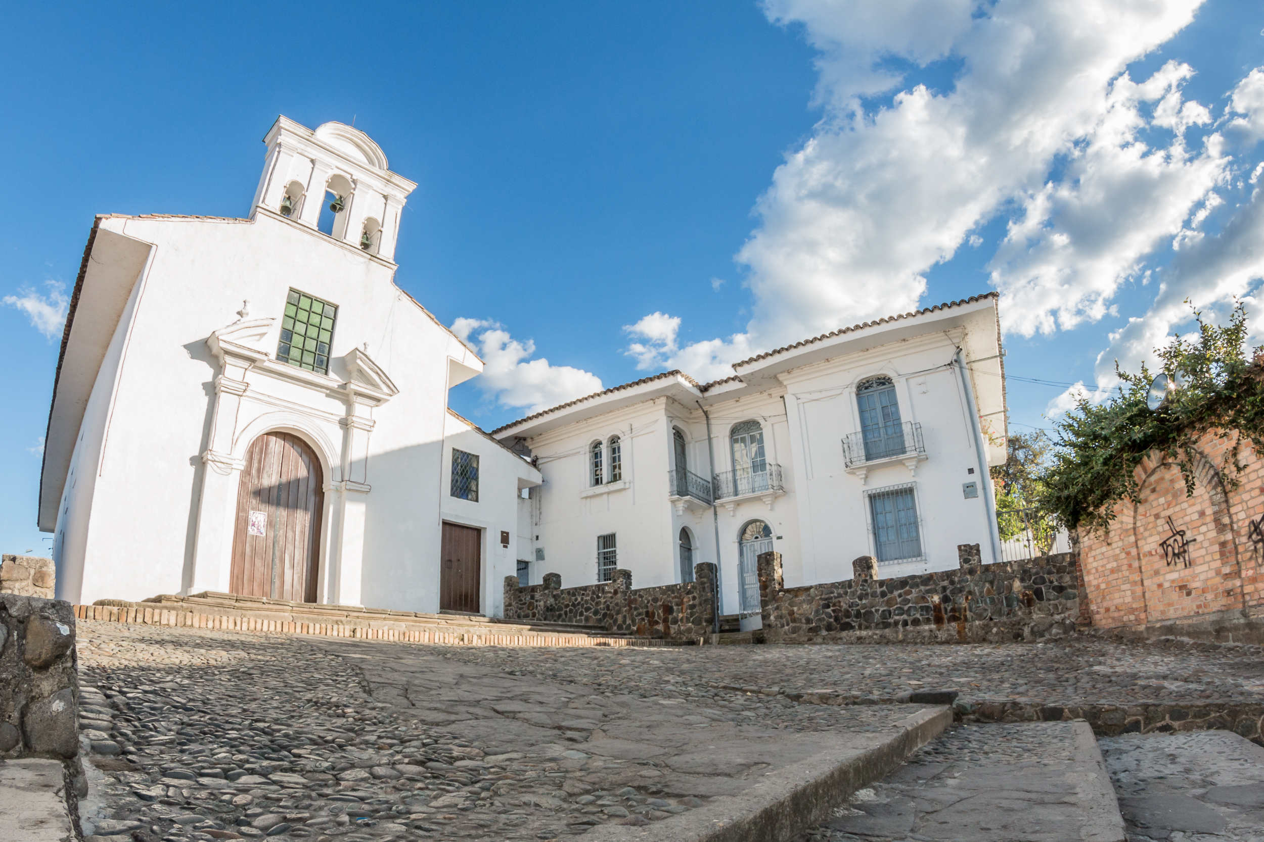 Exterior Ermita Jesus Nazareno en Popayán Colombia Esta fotografía fue tomada en el municipio colombiano con código 19001.